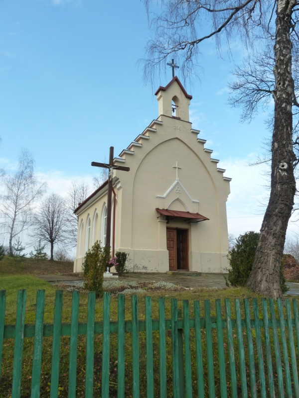 Костел благовірної Броніслави с. Баличі (вигляд фасад)